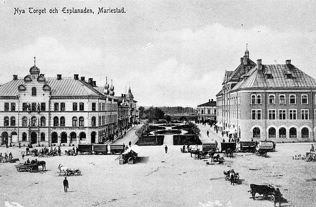 Nya Torget i Mariestad T.v. Skaraborgs läns ränte- och kapitalförsäkringsanstalt. Byggnadsår 1898. Arkitekt Carl Österman T.h. Mariestads sparbank. Byggnadsår 1898-99. Arkitekt Martin Borgstedt